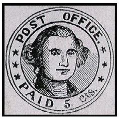 Почтовая марка США, MILLBURY Mass. Scott №7X1